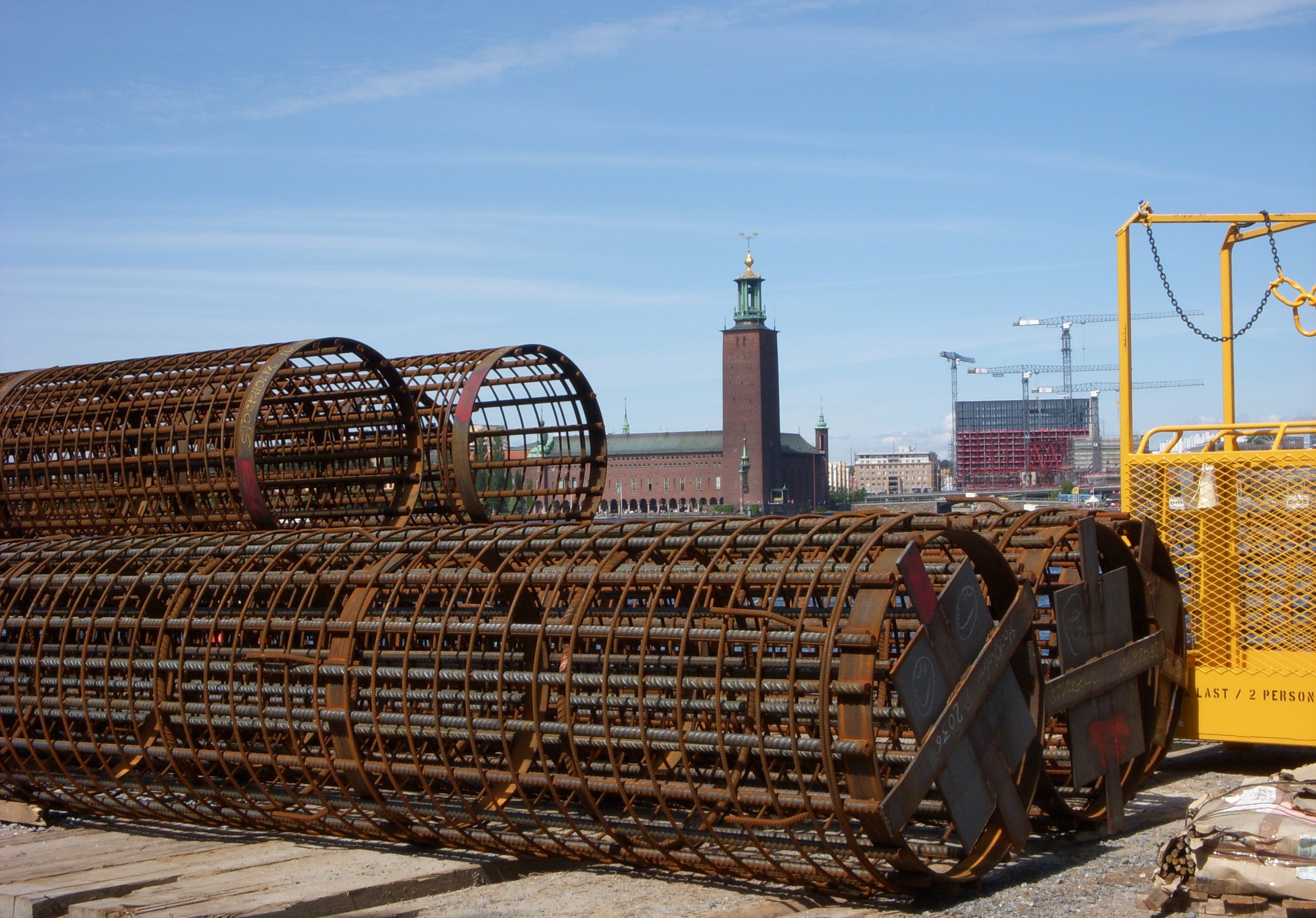 Citybanan, Stockholm, bygget vid Söder Mälarstrand, Stadshuset i bakgrunden